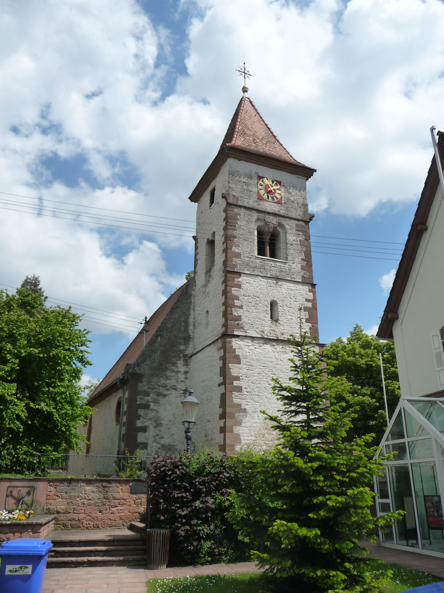 Ebertsheim, ist eine Ortsgemeinde im rheinland-pfälzischen Landkreis Bad Dürkheim und liegt im Nordwesten der europäischen Metropolregion Rhein-Neckar.